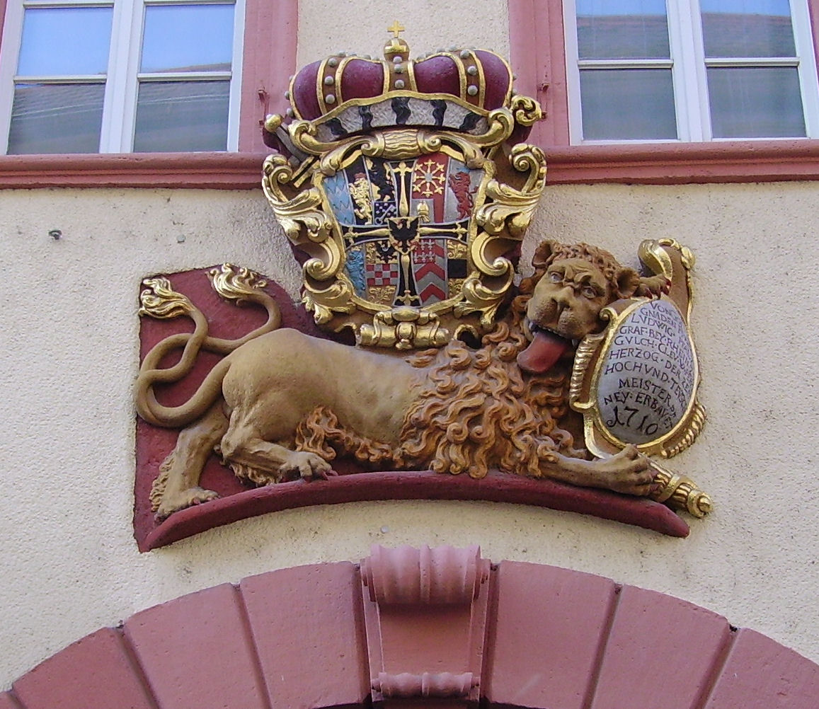 view of Weinheim, Germany